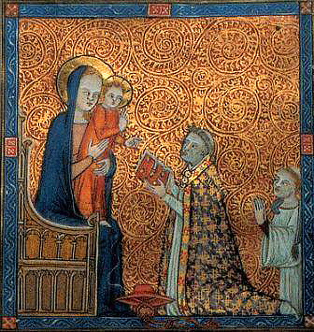 Portrait d'Anglic de Grimoard agenouillé devant la Vierge et l'Enfant entre 1366 et 1368